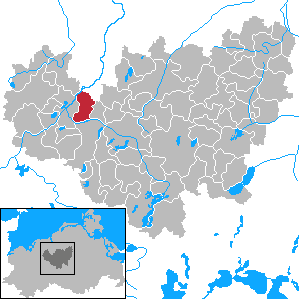 Zepelin in Mecklenburg-Vorpommern - District Güstrow